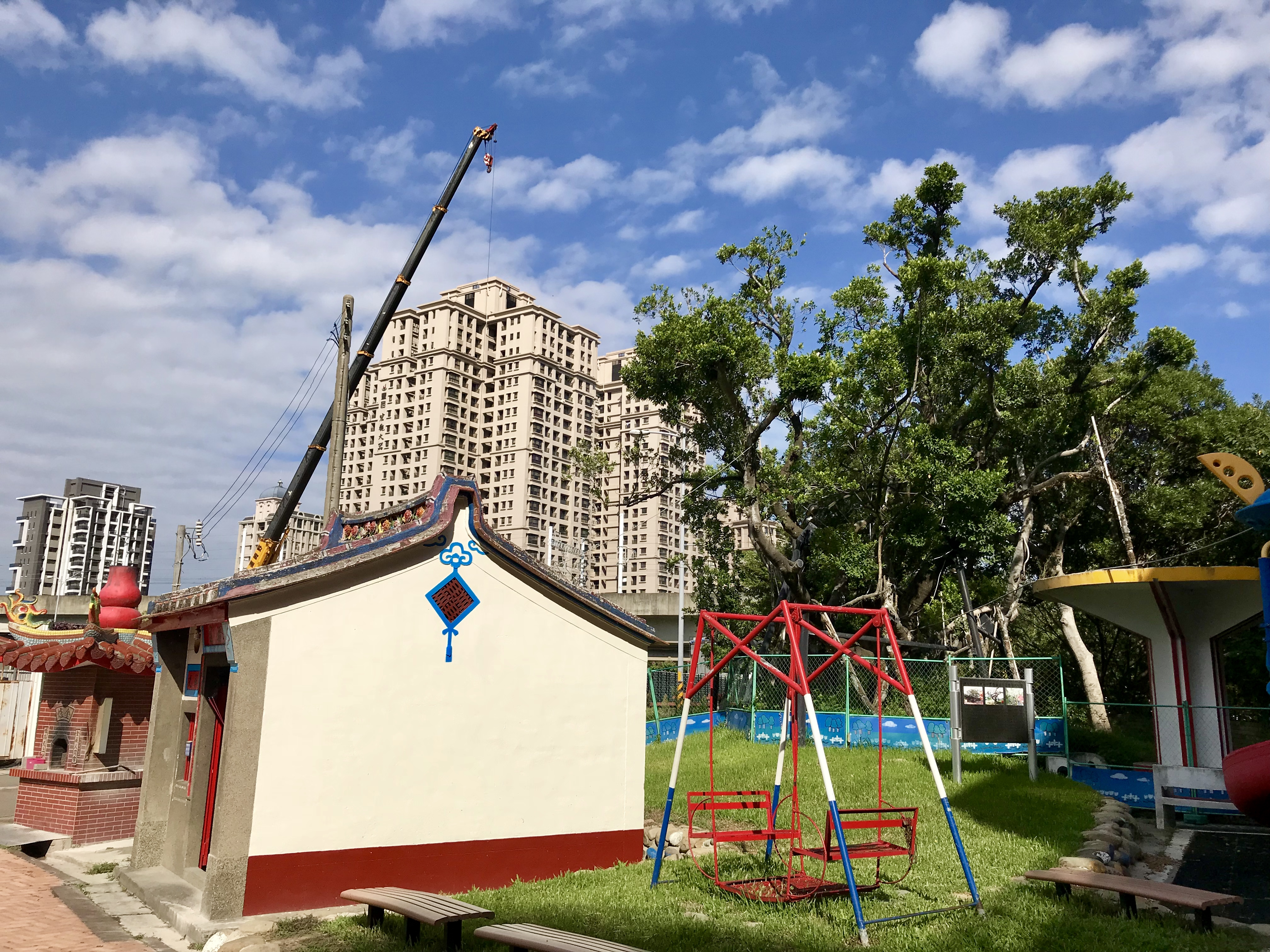 隘口伯公廣福宮後的夫妻榕樹